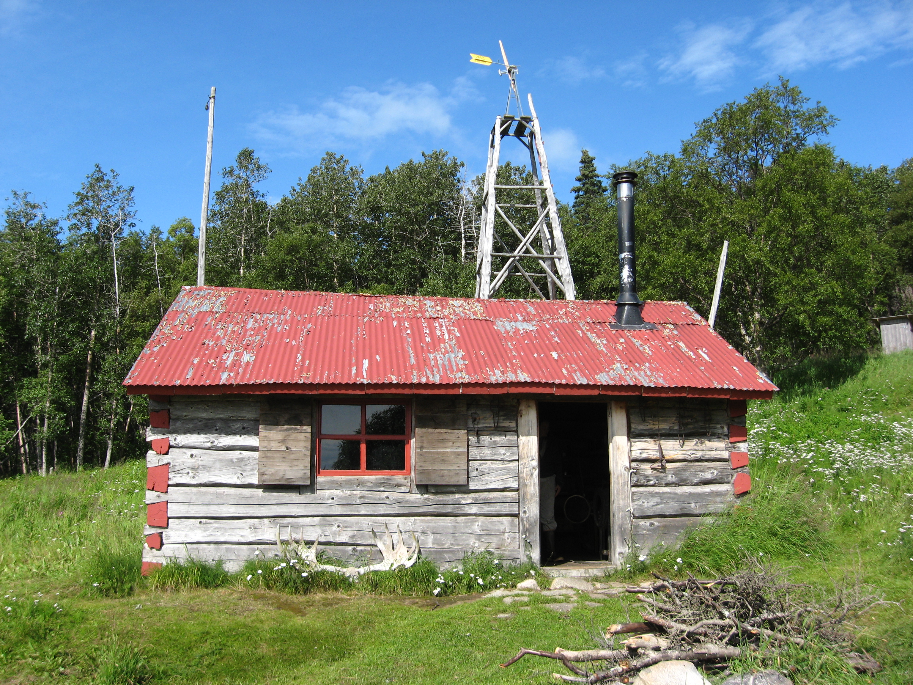 Fure's Cabin